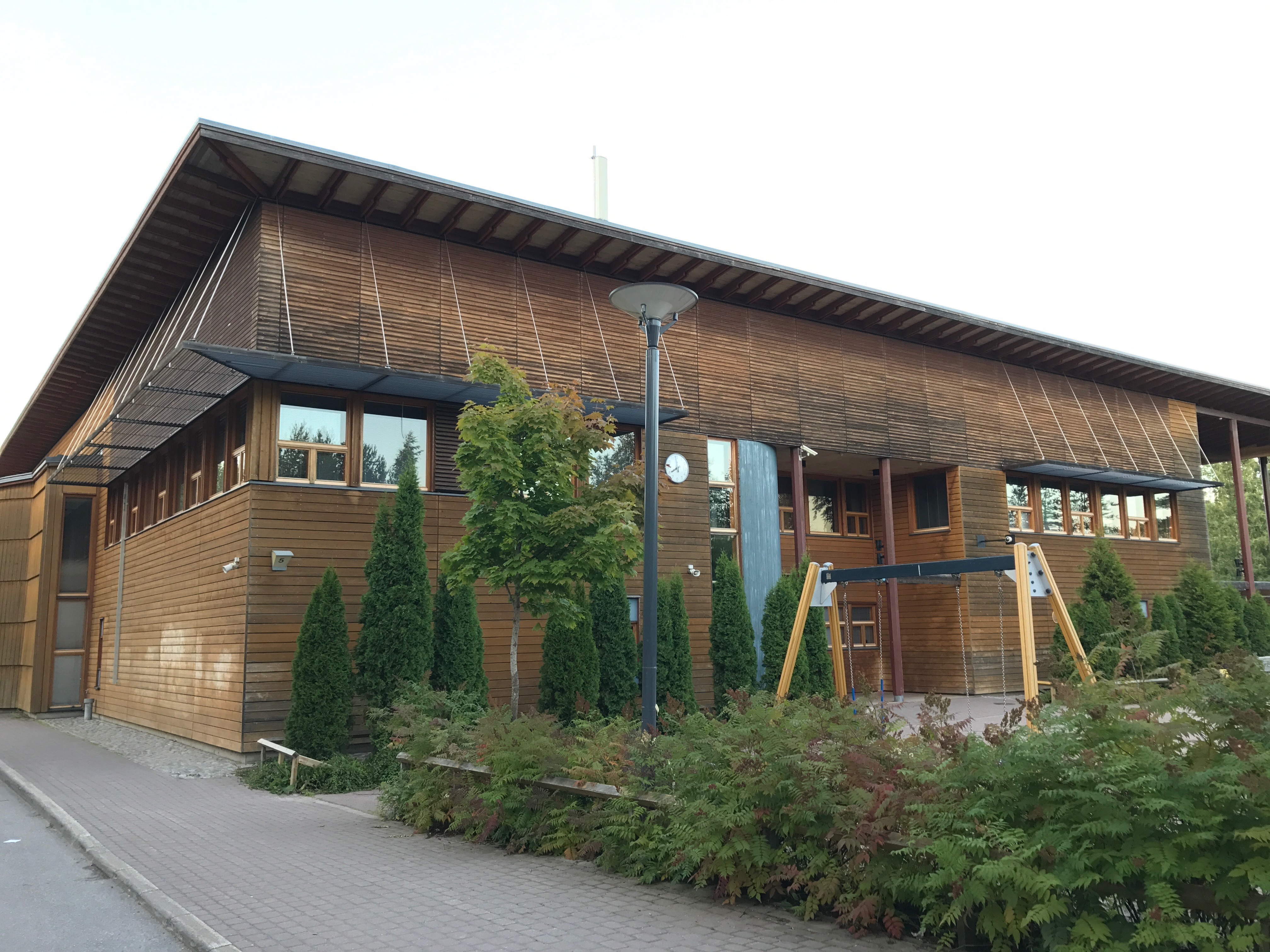 Hösmärinpuiston koulu Espoon keskuksessa.